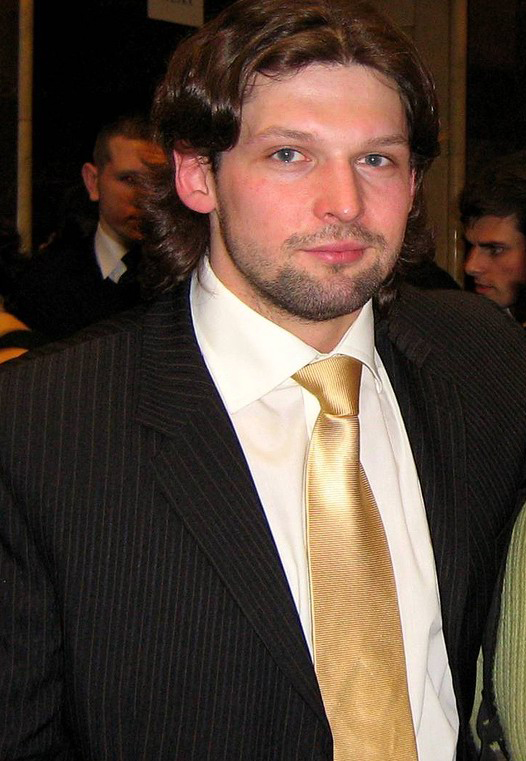 Szymon Kołecki (ur. 12 października 1981 w Oławie) – polski sztangista